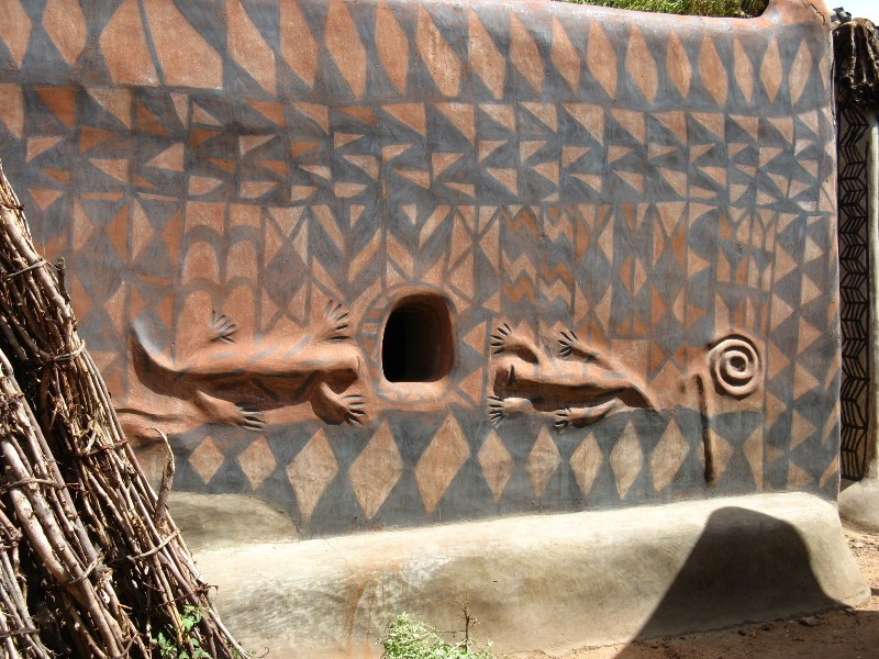 Image de Tiébélé Habitat Kassèna